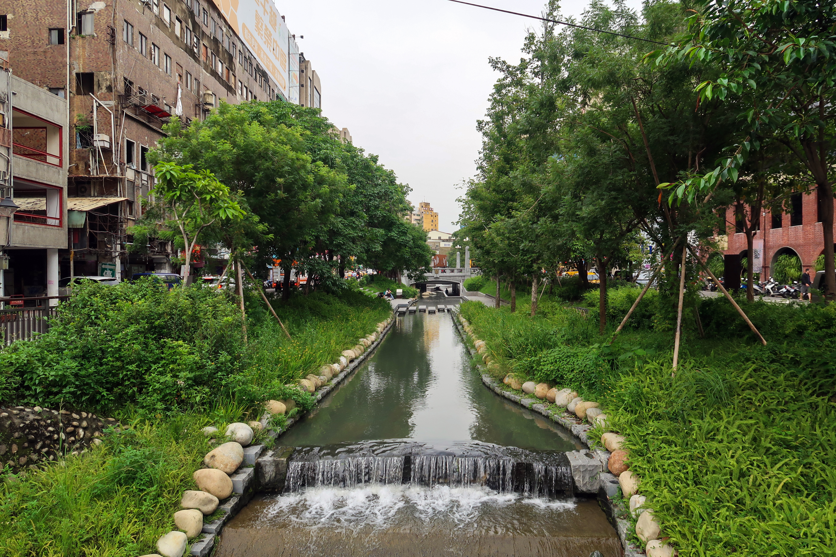 Luchuan Canal (Taichung)